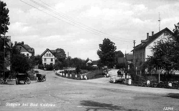 ulica główna na Zakrzu-dzielnica Kudowy-Zdroju